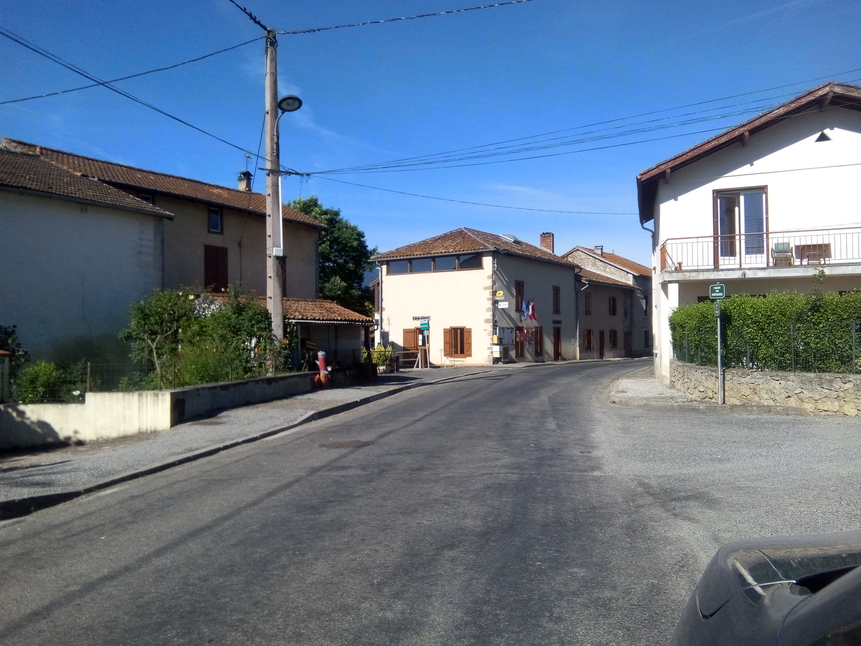 Mairie de Mercenac (Ariège, France).